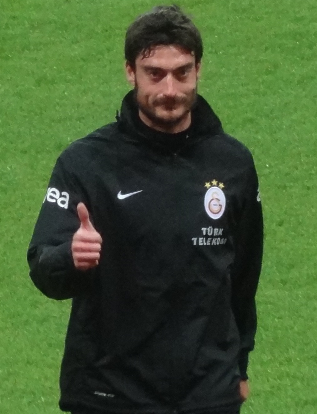 Sivasspor maçı öncesi ALBERT RIERA